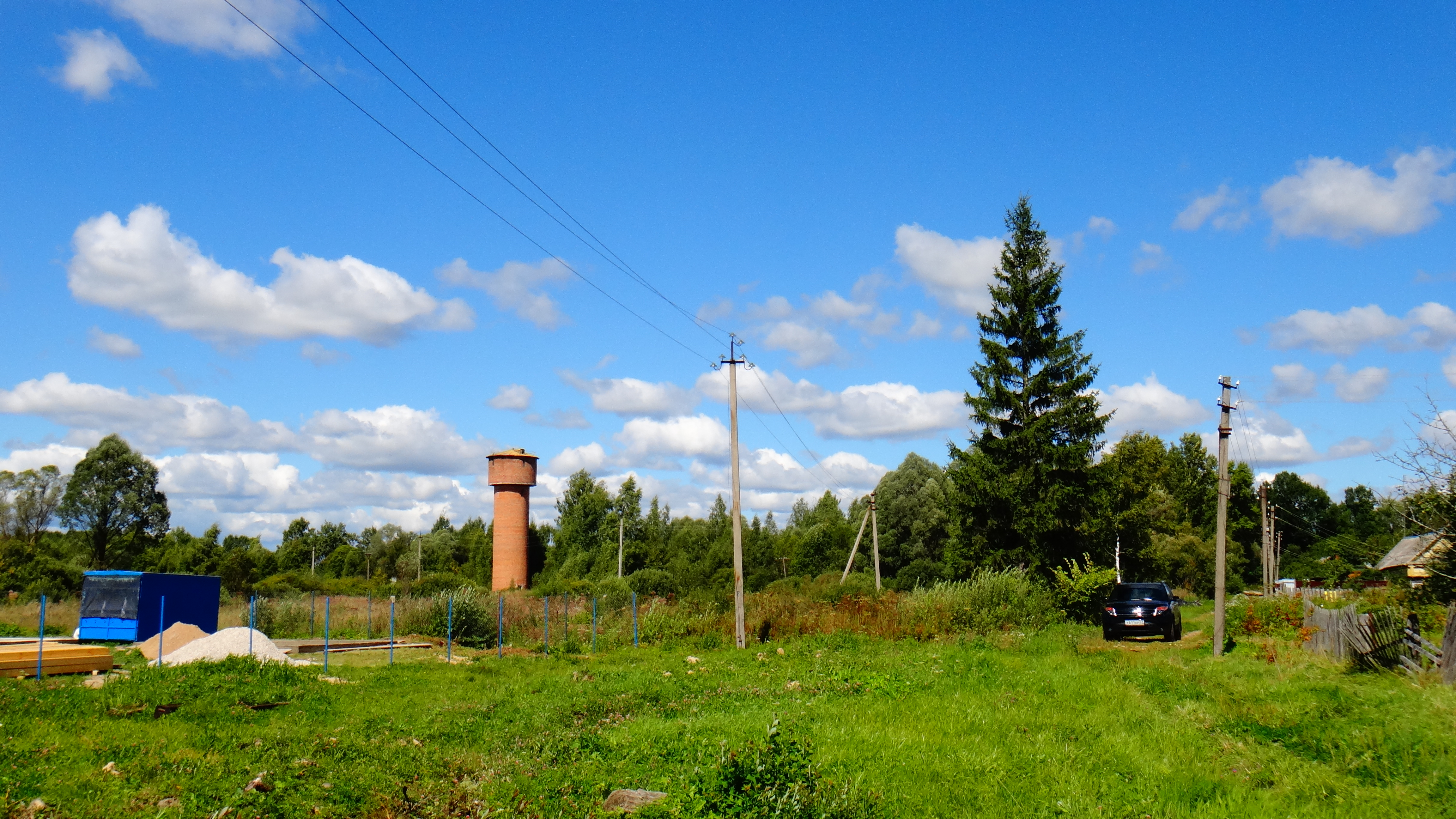 Myatlevo, Kaluzhskaya oblast', Russia, 249875